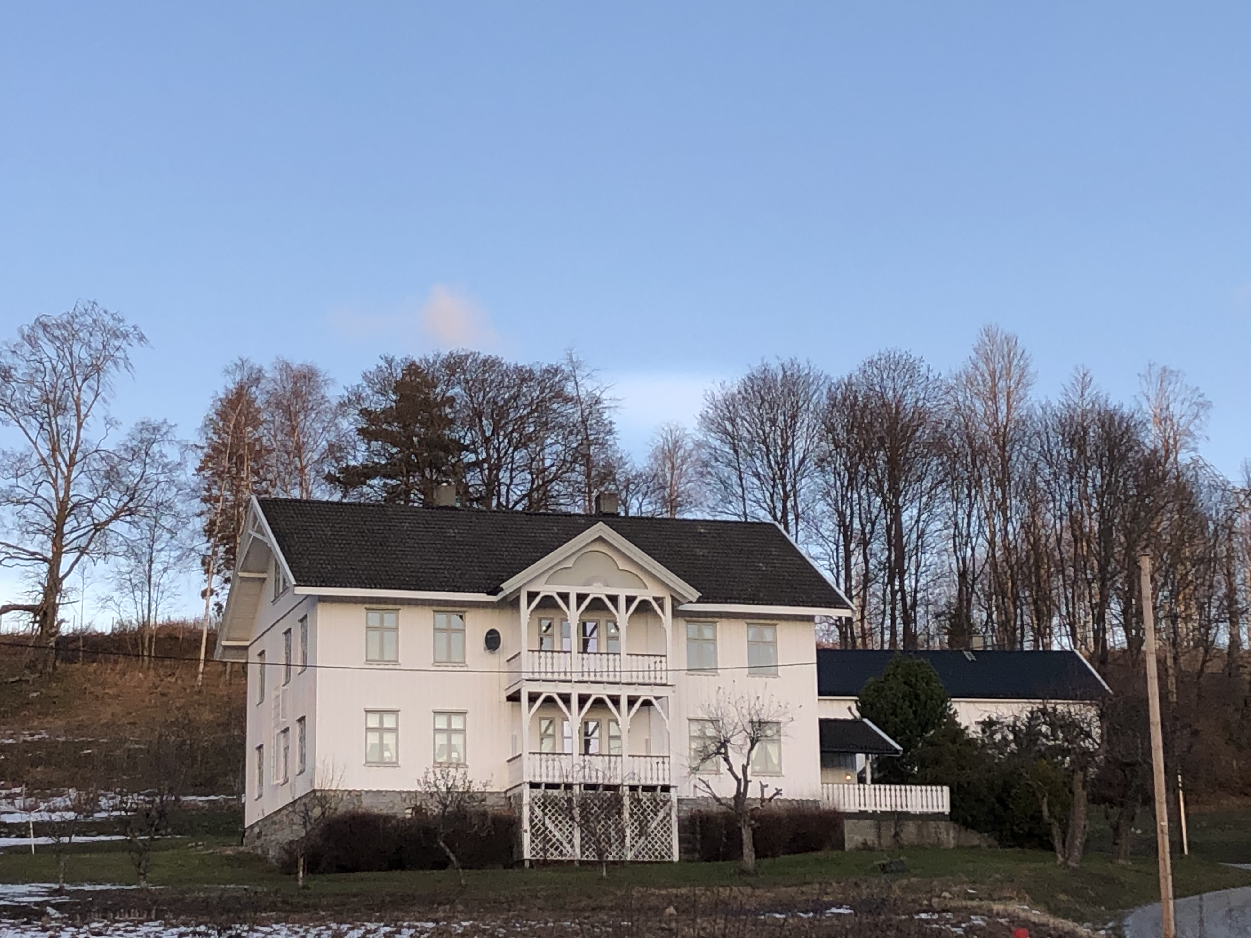 Åsaveien 809, Ringerike